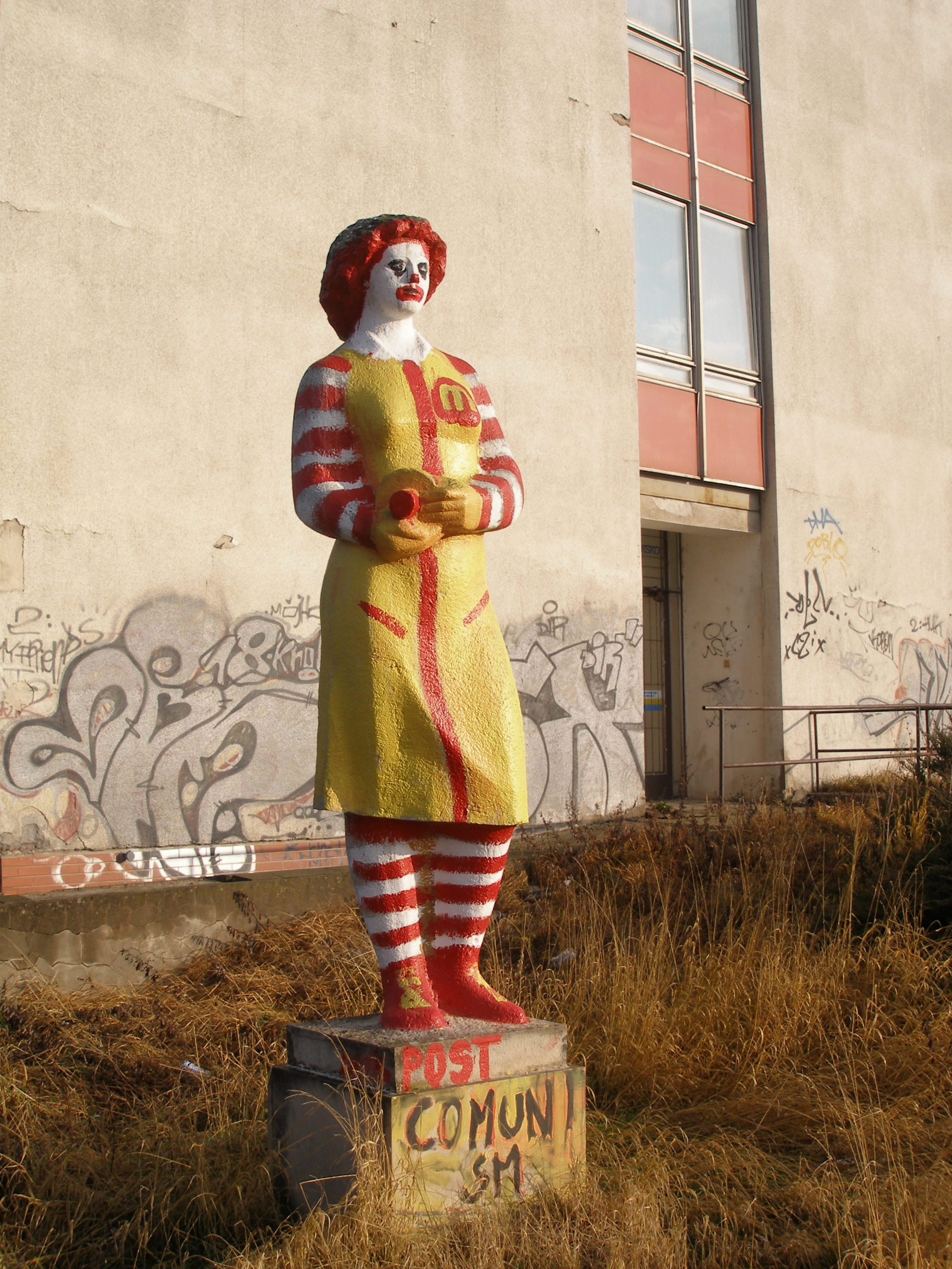 Poškodená socha robotníčky..Ulica Solivarská. Mesto Prešov.